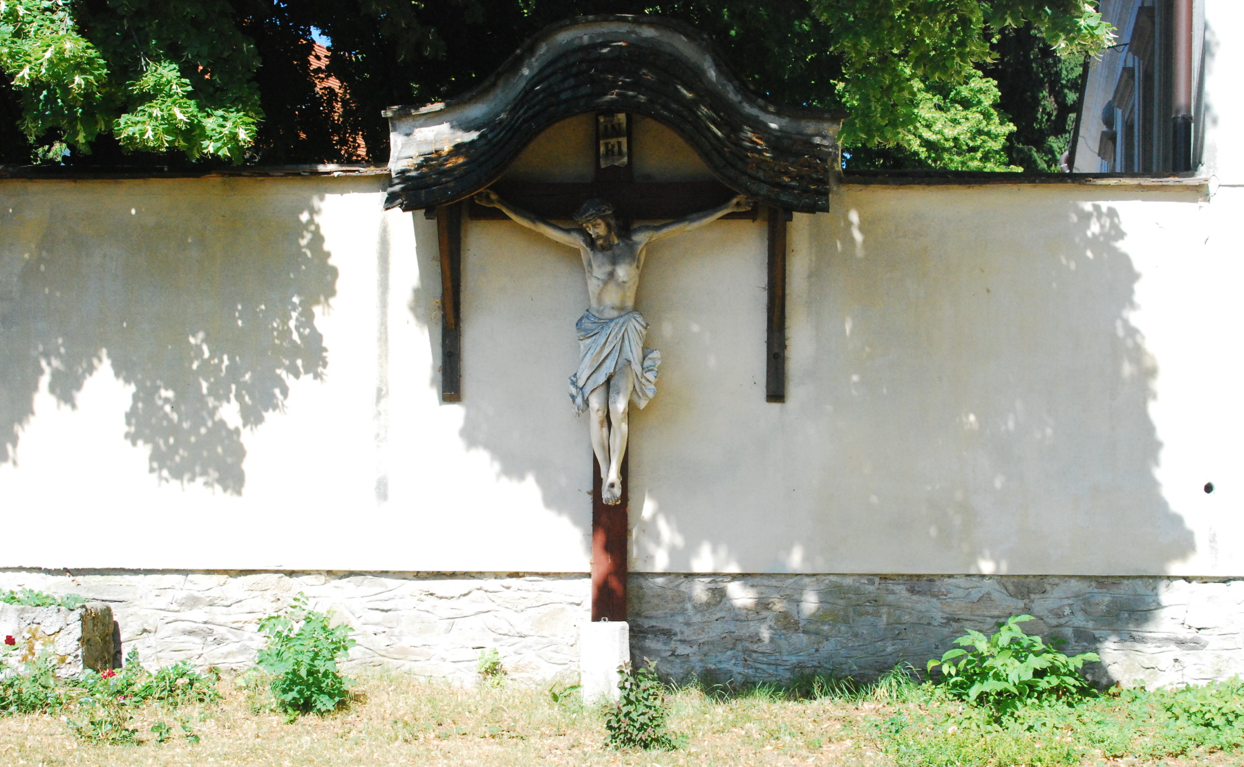 Kreuz vor der Kirche von Reinprechtspölla in Niederösterreich